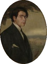 Self-portrait